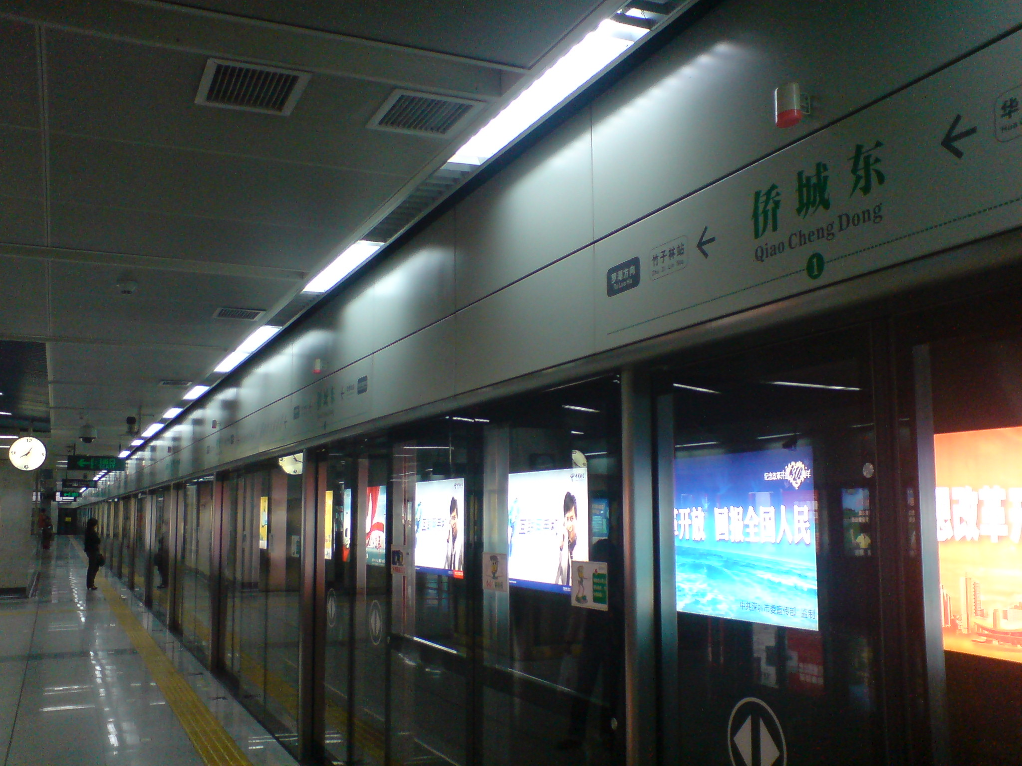 深圳地鐵僑城東站內